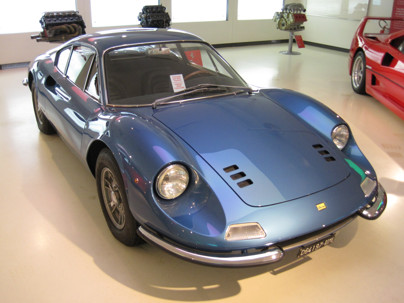 Automobiles in the Galleria Ferrari - Dino 206 GT V6 - 1967